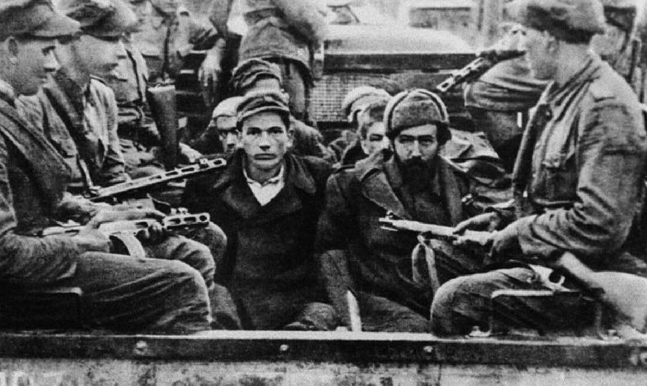 Депортація українців у рамках акції «Вісла», квітень 1947 р.